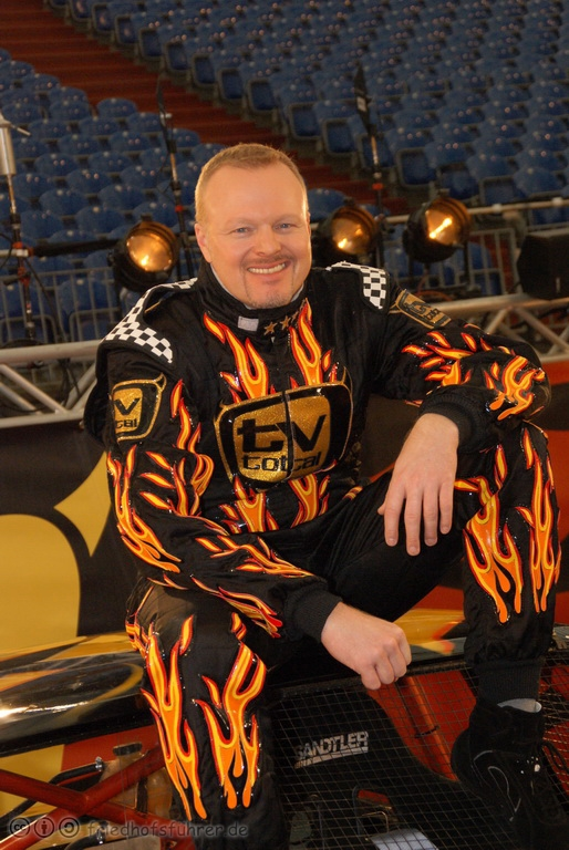 Stefan Raab bei der Pressekonferenz zur TV total Stock Car Crash Challange 2010